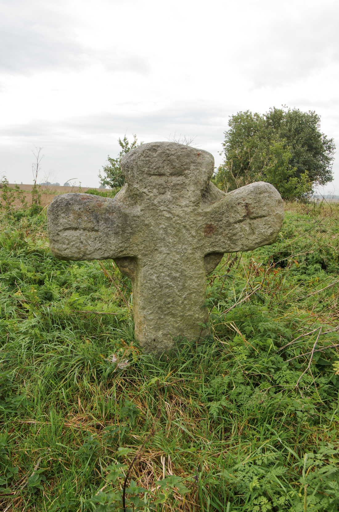 Povodí u Třebeně, smírčí kříž, okres Cheb